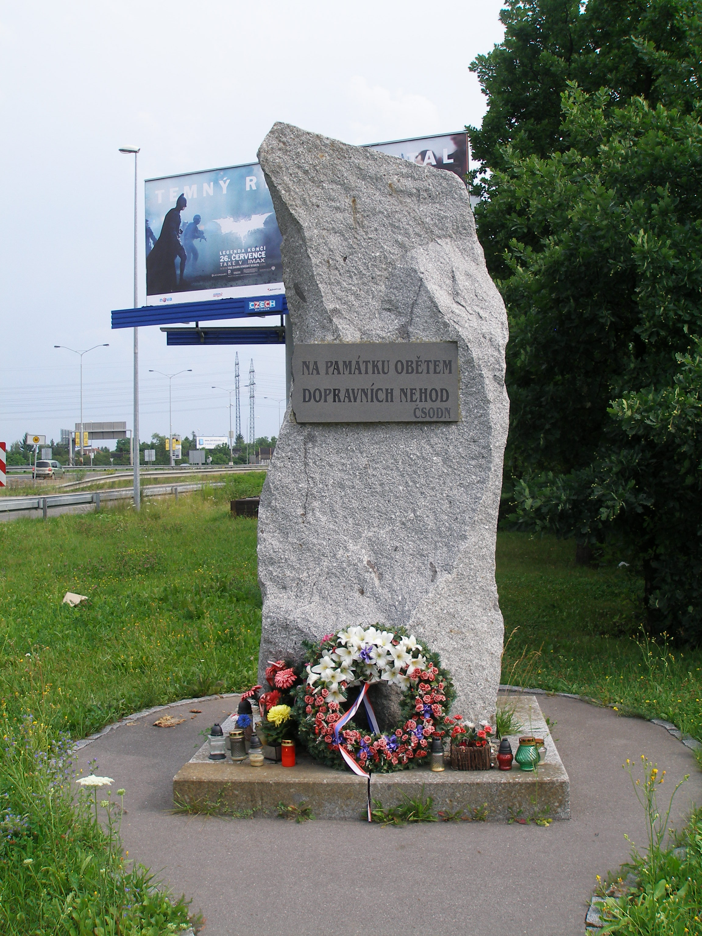 Památník obětem dopravních nehod v blízkosti čerpací stanice Agip na pražském Chodově.